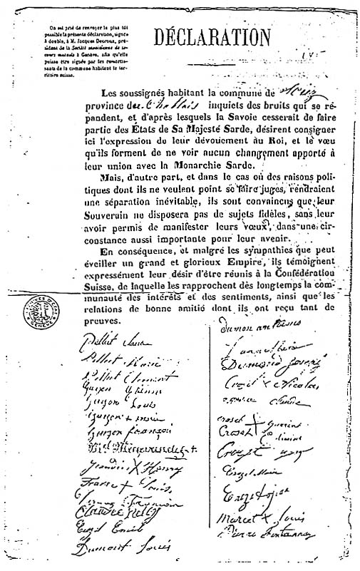 Pétition des habitants de la commune de Sciez (Chablais) demandant le rattachement à la Suisse. Archives du canton de Genève.